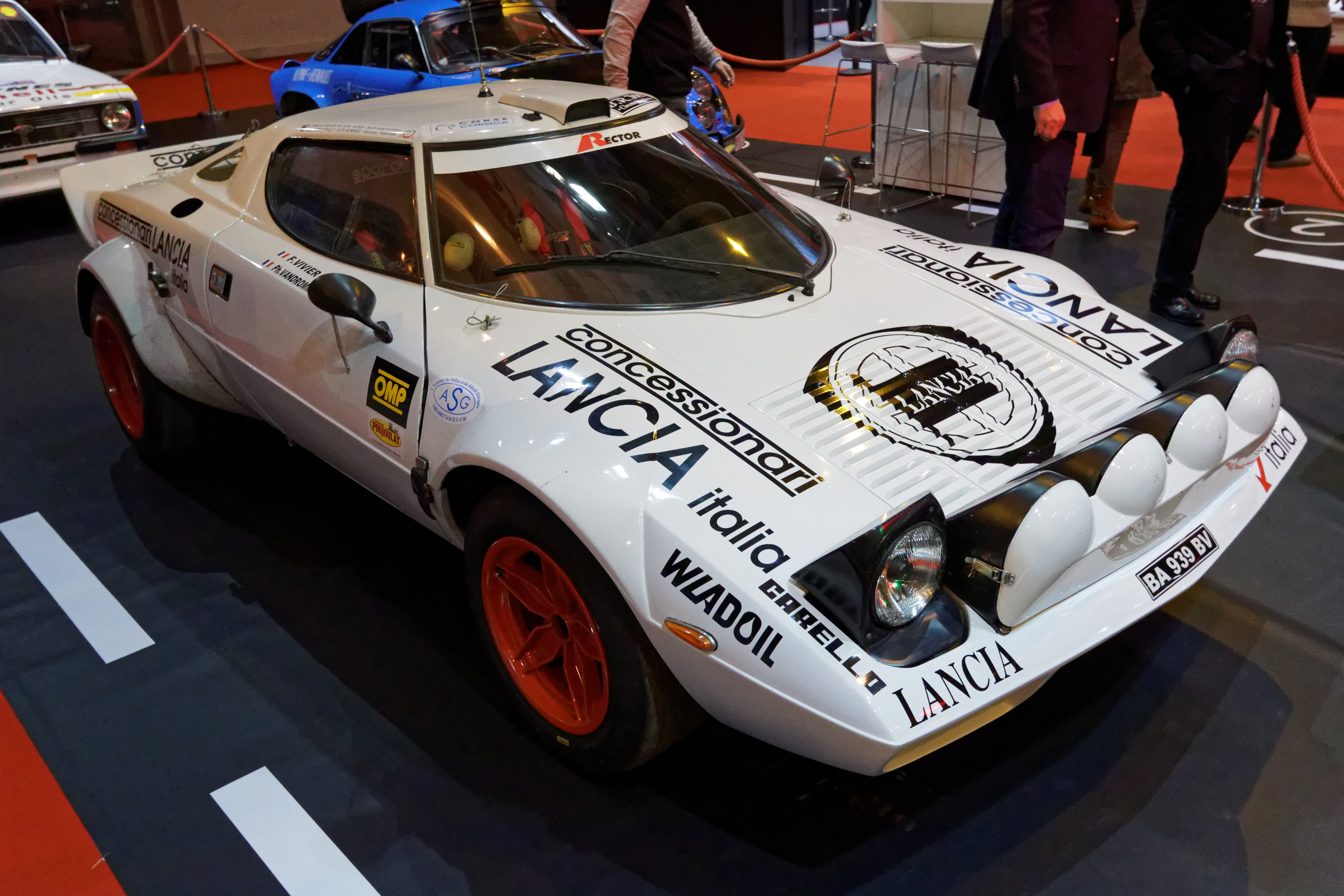 Une des voiture présentée lors du salon Rétromobile de Paris 2015